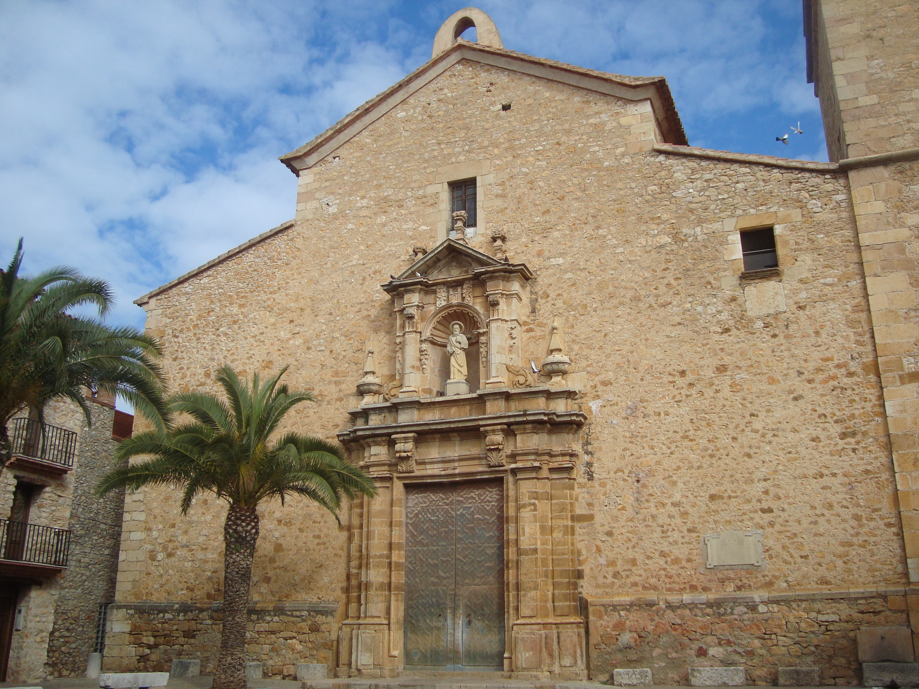 Església parroquial de Sant Bartomeu (Vilanova d'Alcolea) 05.132-002.